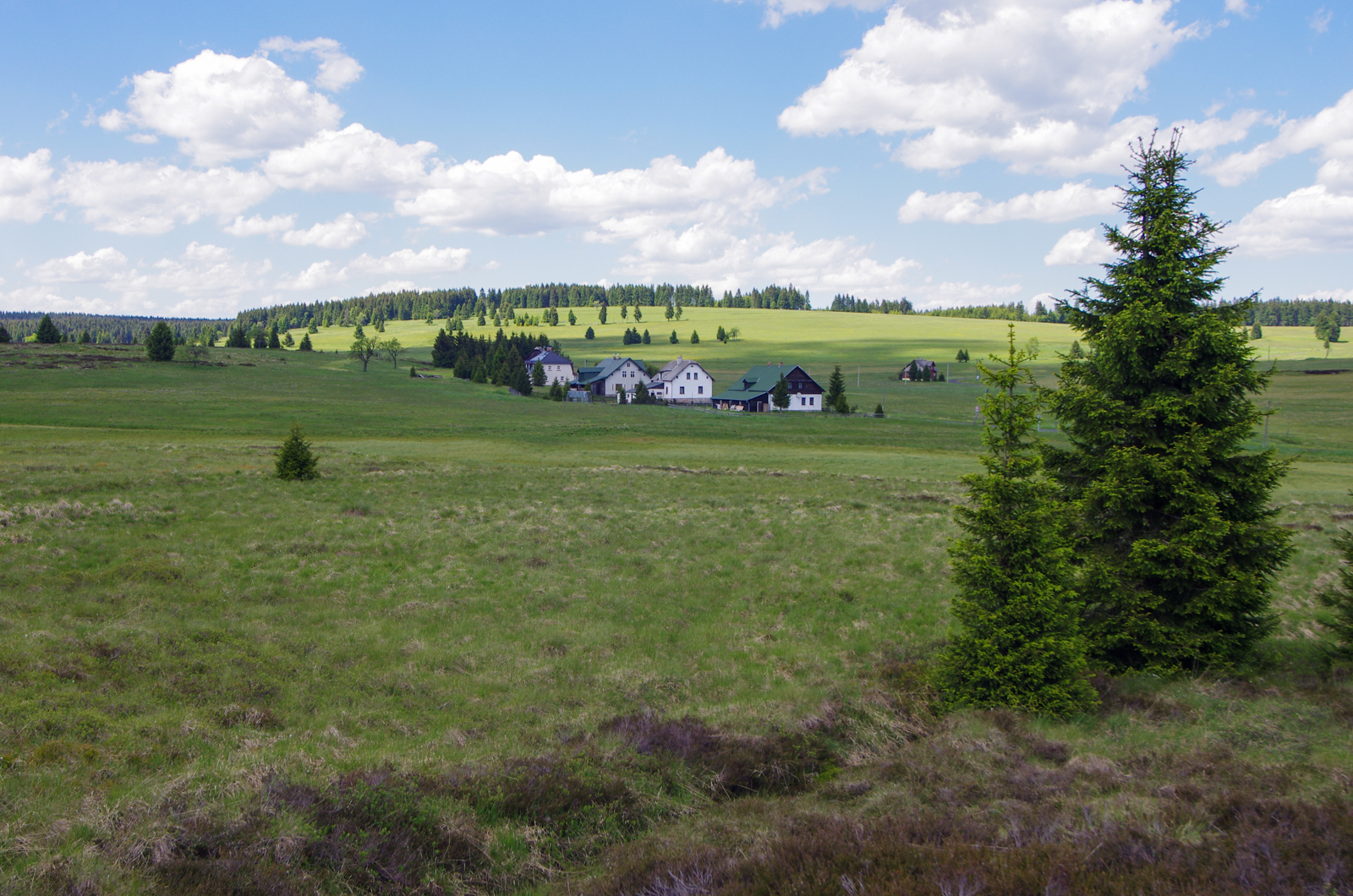 Rolava, zaniklá obec, pohled od Přebuzského vřesoviště, Krušné Hory, okres Sokolov